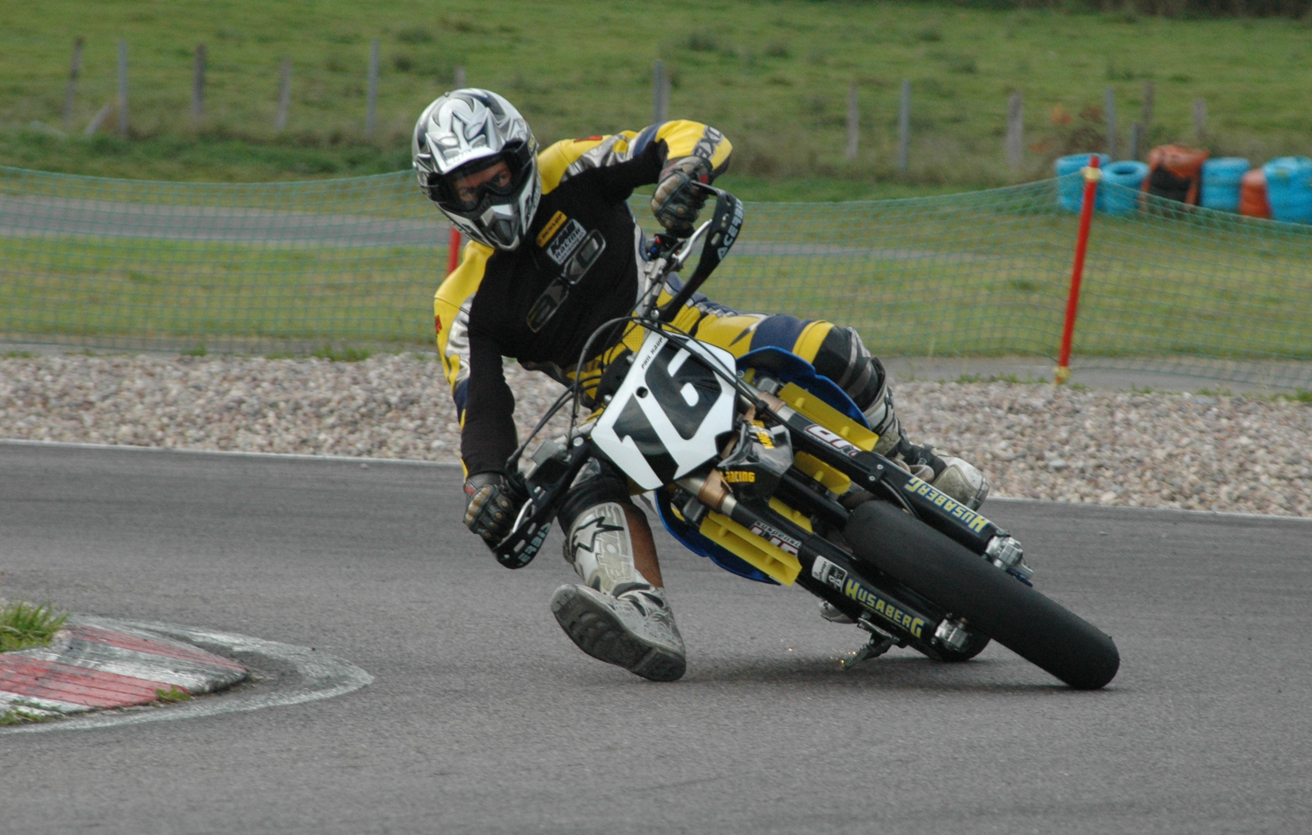 A Supermoto Rider